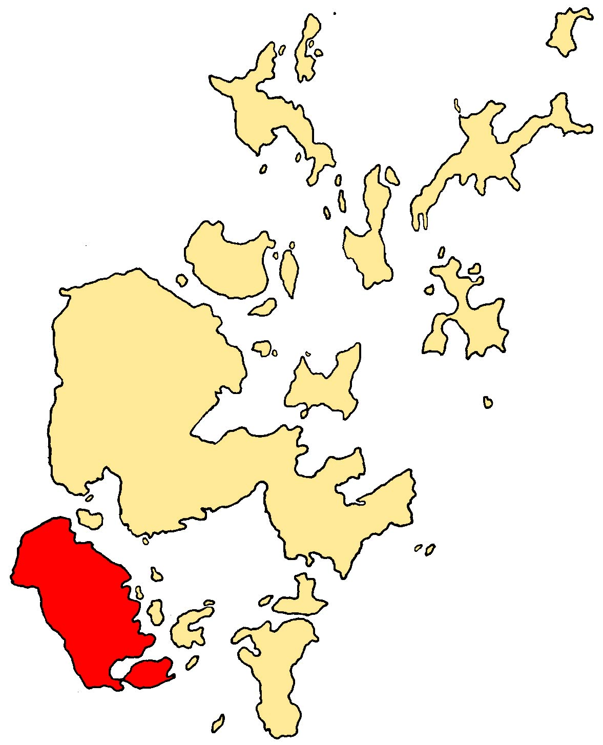 Hoy